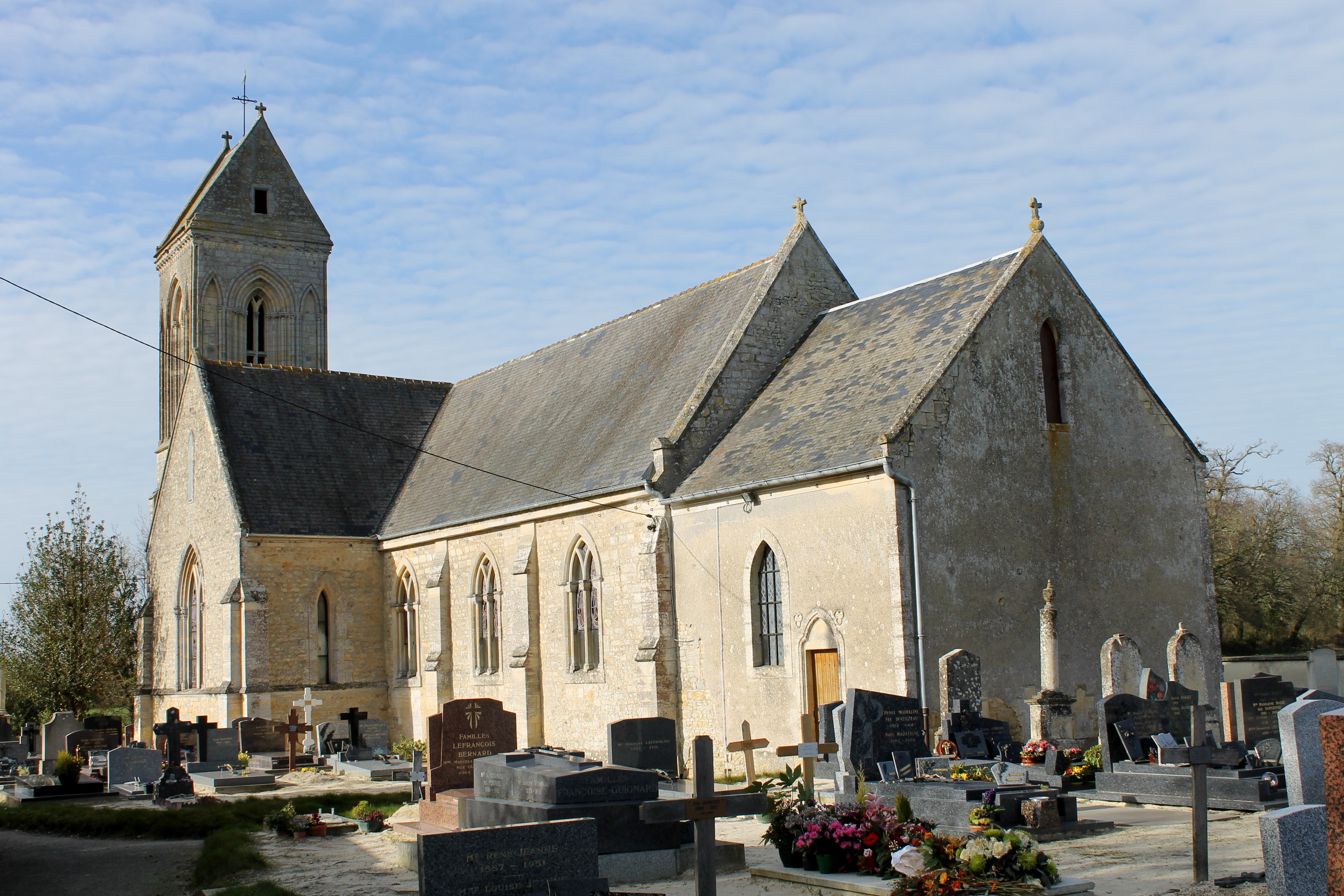 Église Saint-Pierre à Ellon (Calvados)